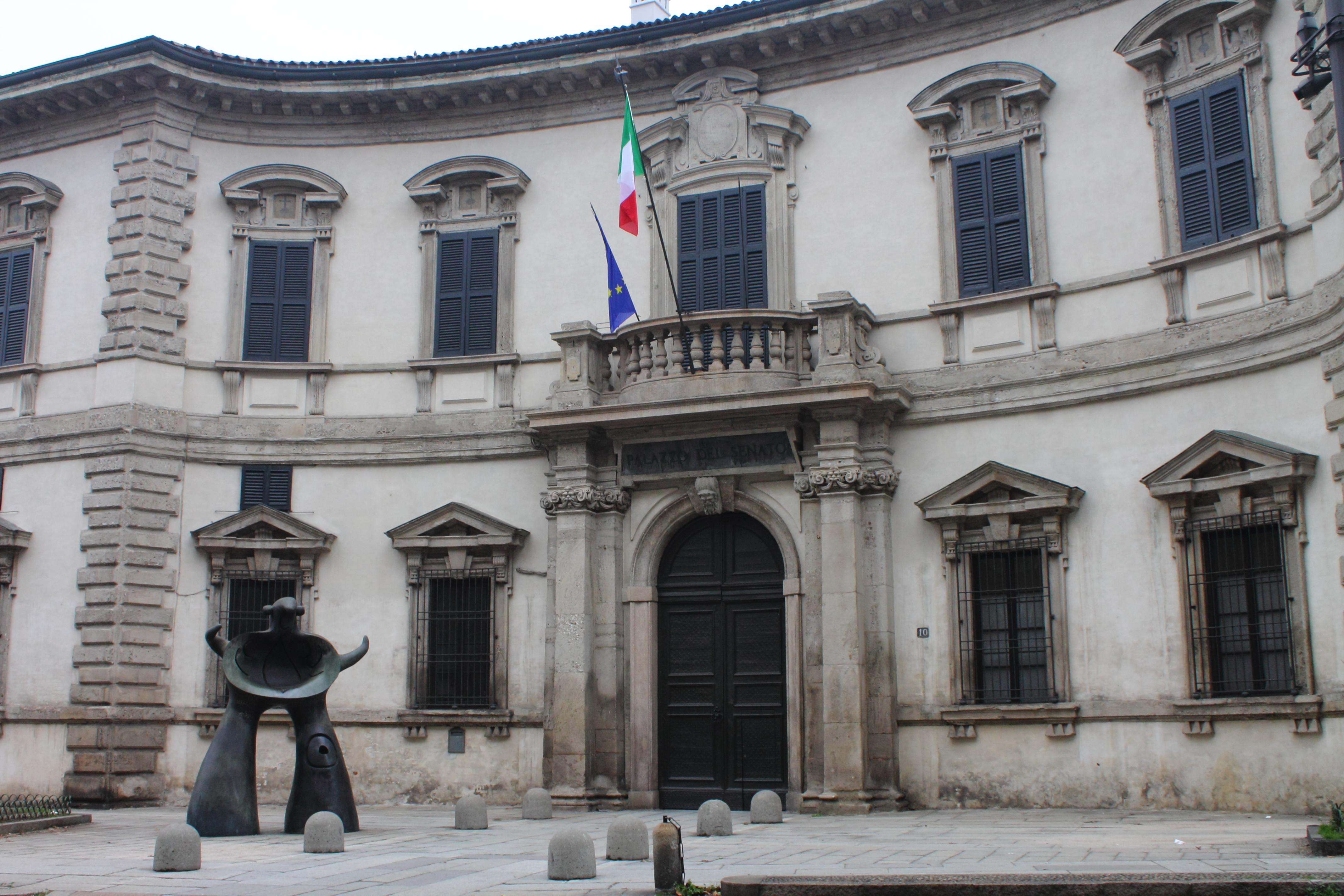 Palazzo del Senato - 1608 - facciata di F.M.Ricchino con la scultura "Mere Ubu" donata nel 1973 dall'artista Joan Mirò - Milano